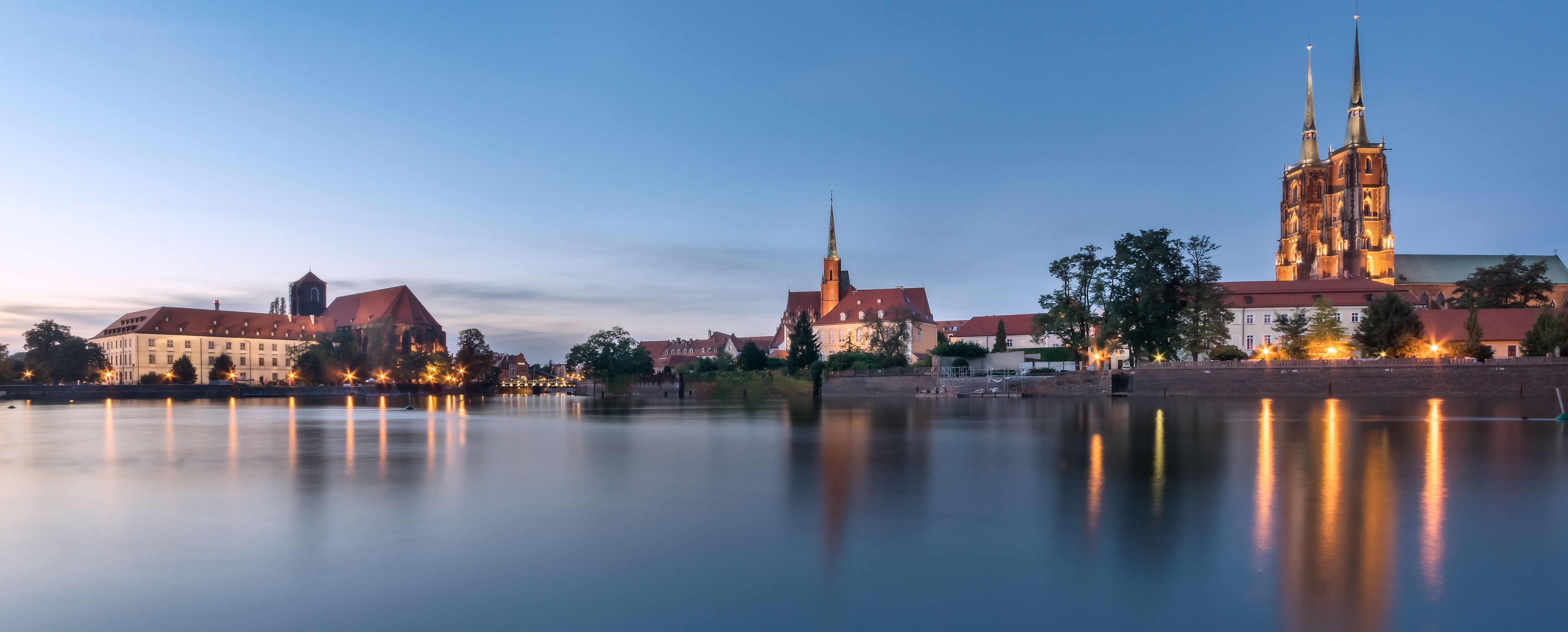 Wrocław, zespół urbanistyczny Ostrowa Tumskiego i wysp: Piaskowej, Bielarskiej, Słodowej